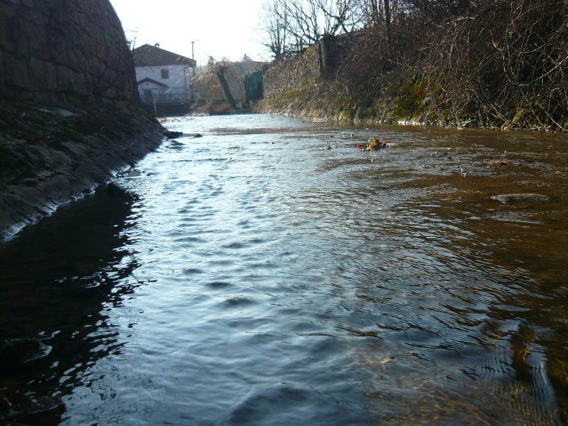 Il torrente Rosandra presso Klanec